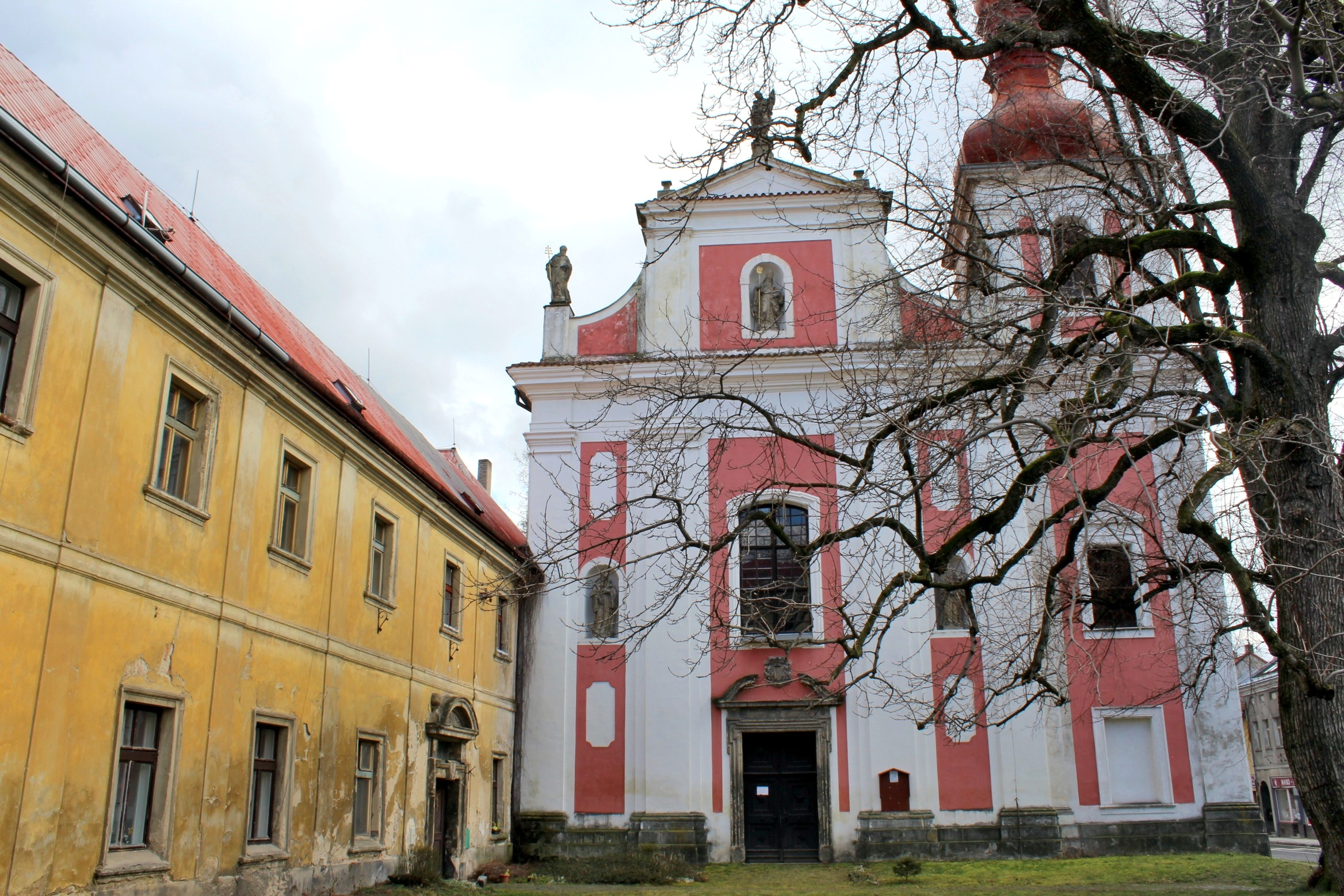 Bělá pod Bezdězem, kostel sv. Václava